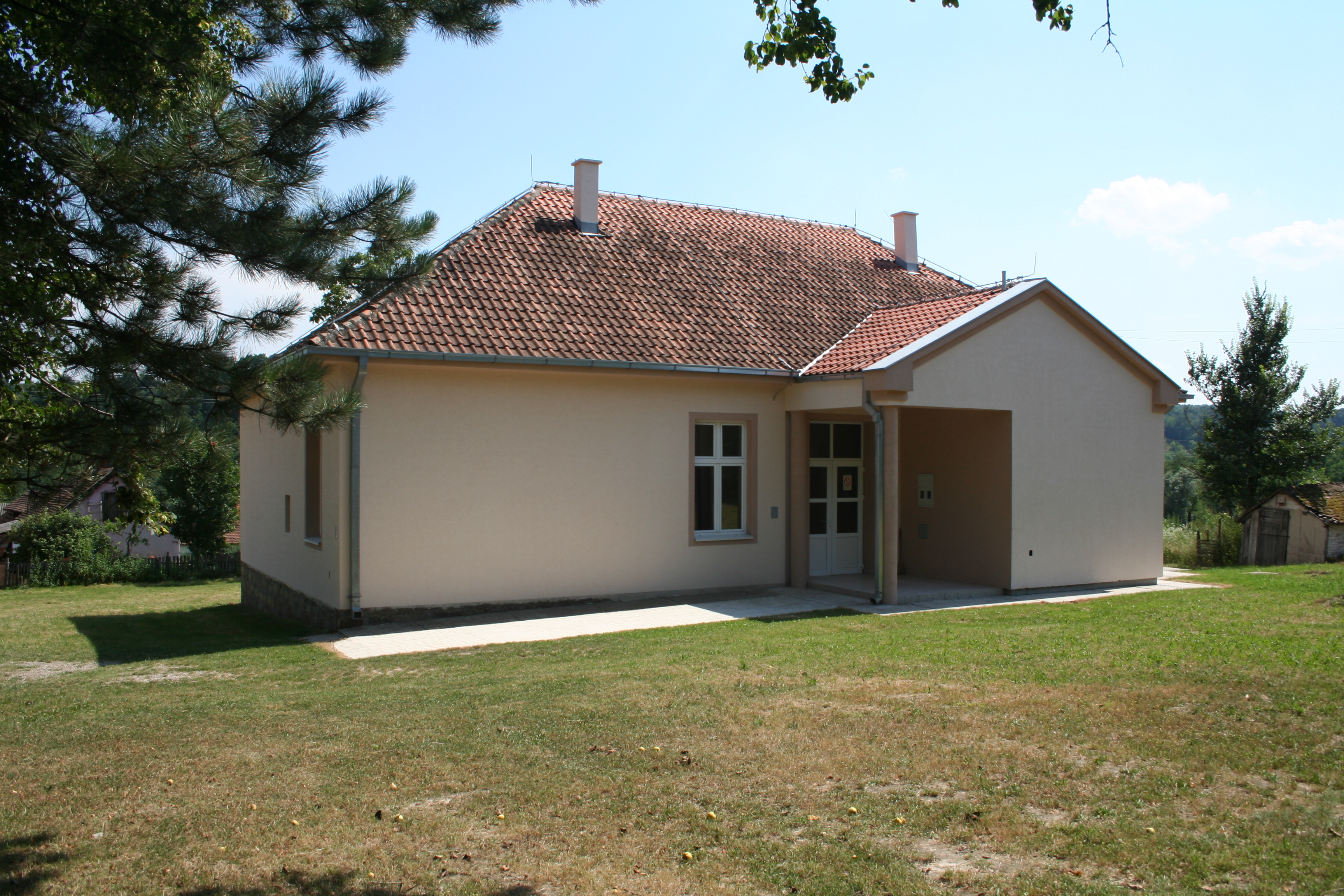 Zgrada škole, Dvorište